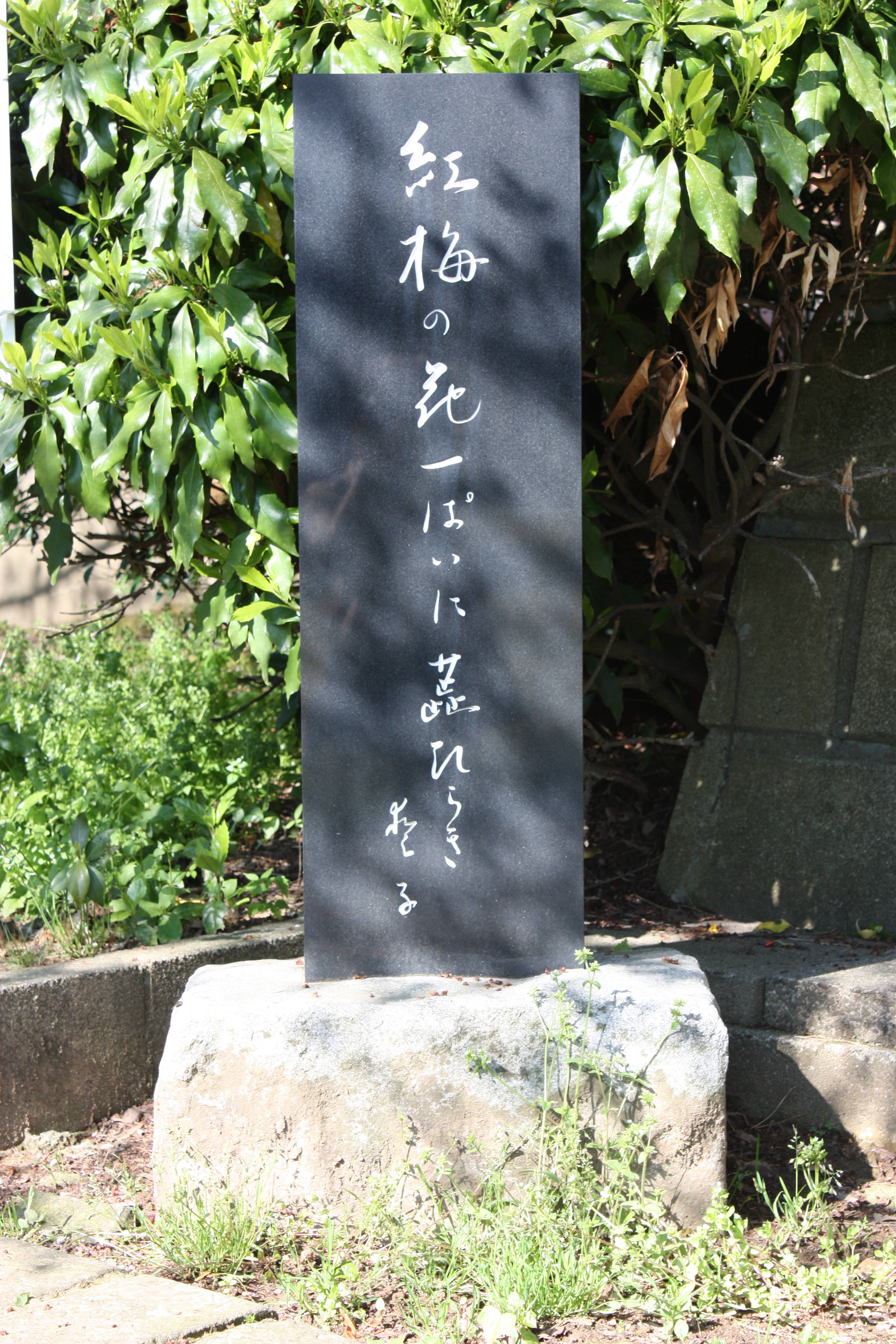 性海寺にある森田愛子句碑